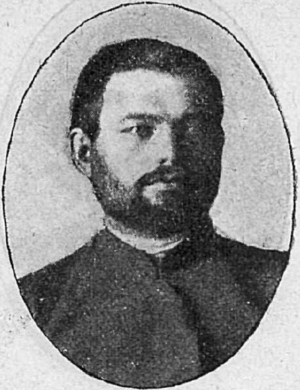 Павел Петрович Вопилов (1878, Оренбургская губерния — после 1907) — крестьянин, сельский учитель, депутат II Государственной думы Российской империи от Оренбургской губернии (1907).